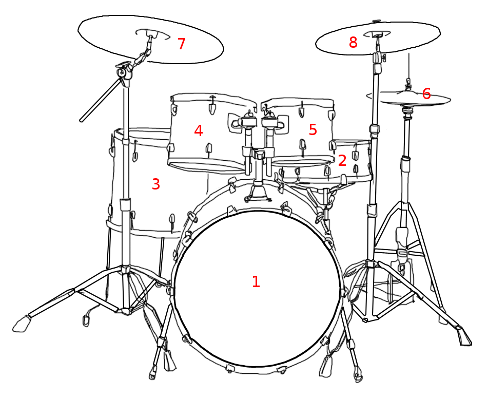 Légende d'un kit de batterie.